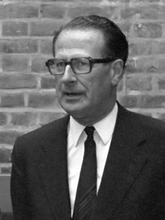 Regeringsdelegatie ontvangt in de Ridderzaal in Den Haag leden van het dagelijks bestuur van de vier grote steden. Vlnr. burgemeester Samkalden (Amsterdam), minister-president Den Uyl, burgemeester Thomassen (Rotterdam), burgemeester Van Tuyll van Serooskerken (Utrecht), burgemeester Marijnen (Den Haag). Achter Den Uyl minister Duisenberg van Financiën 25 april 1974